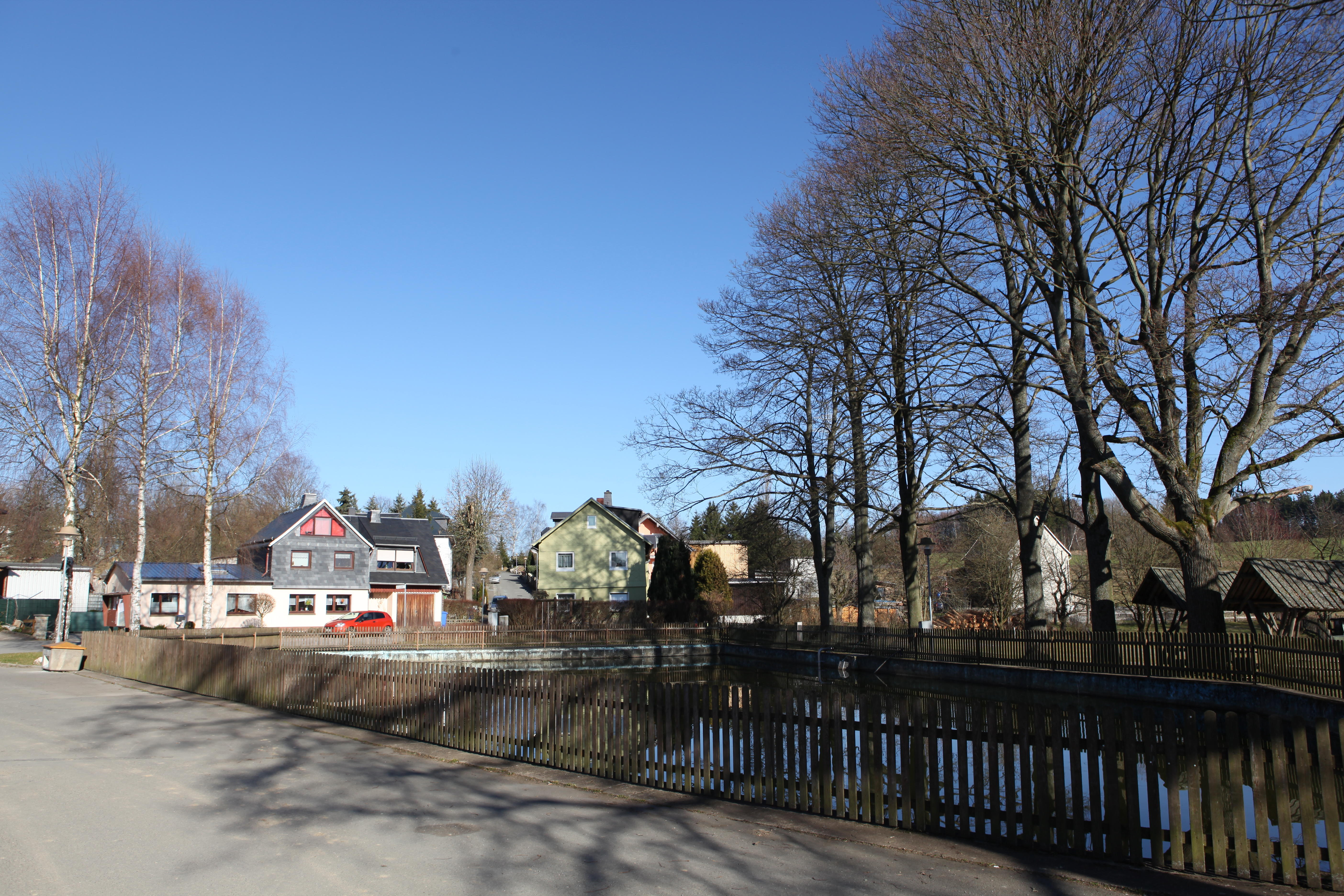 Birkenhügel Teich in Pirk